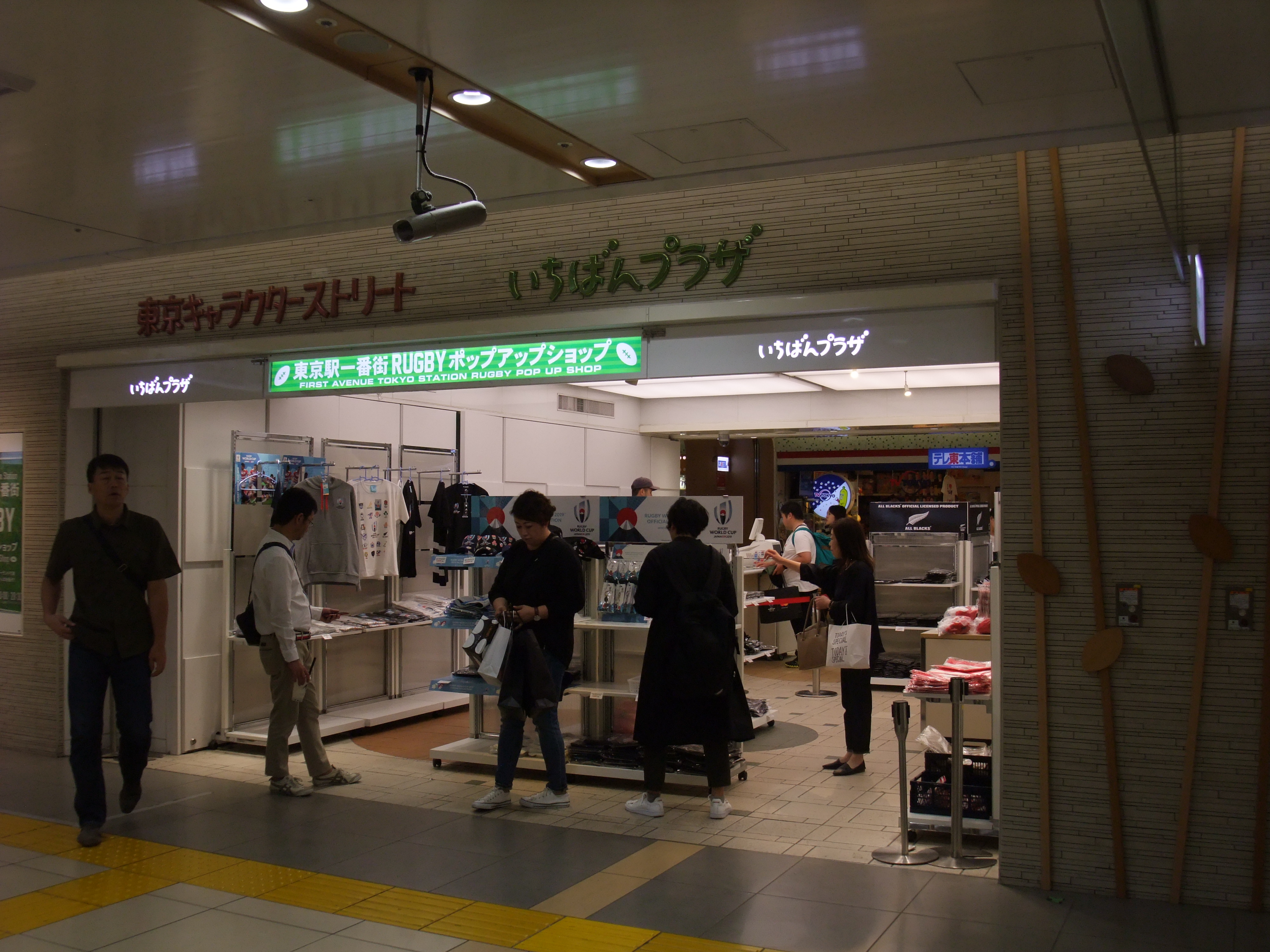 東京駅一番街いちばんプラザ